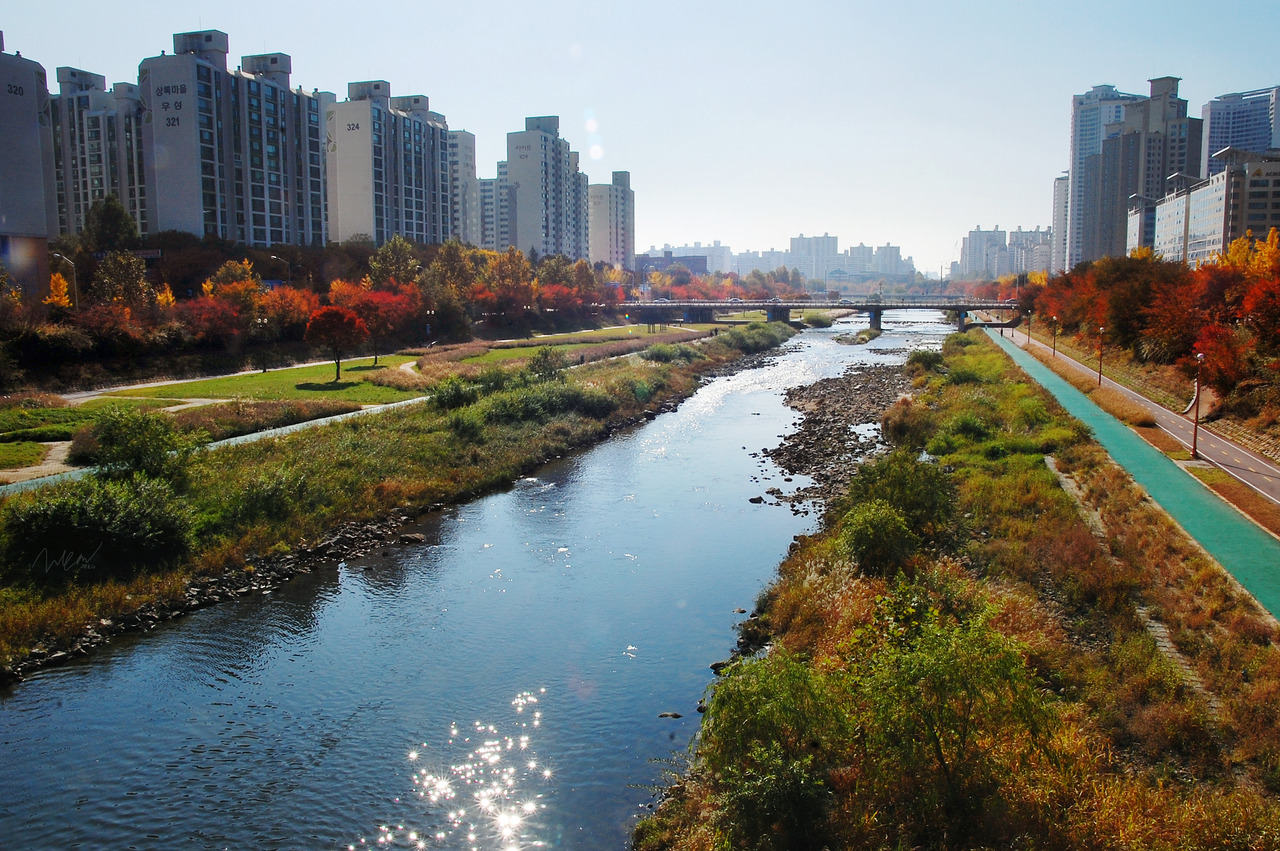 seongnam city -2013